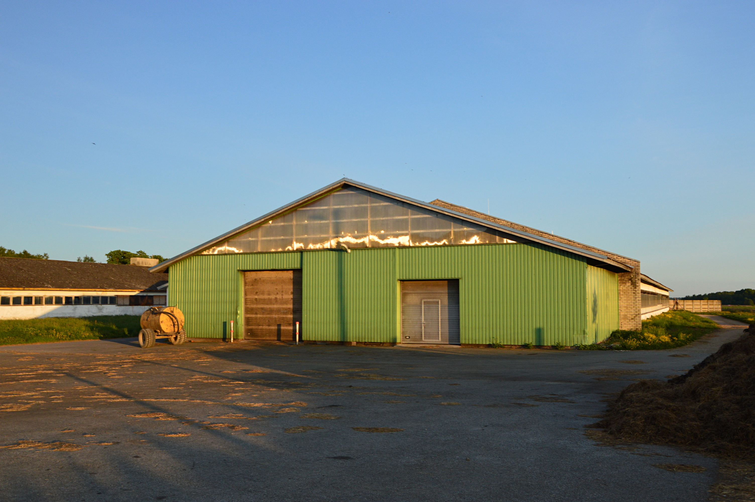 Vilama taluühistu loomalaudad.